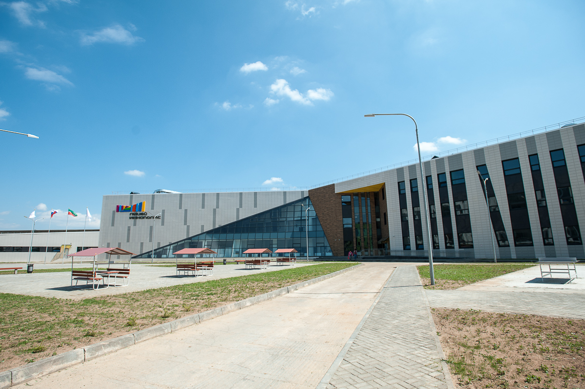 ИТ-лицей в Иннополисе